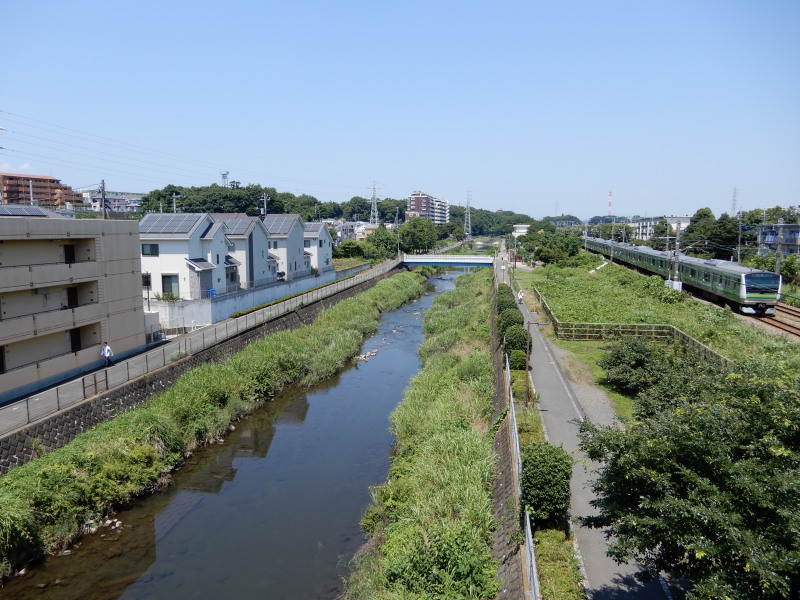 森野橋から見た境川（東京都町田市森野5丁目）